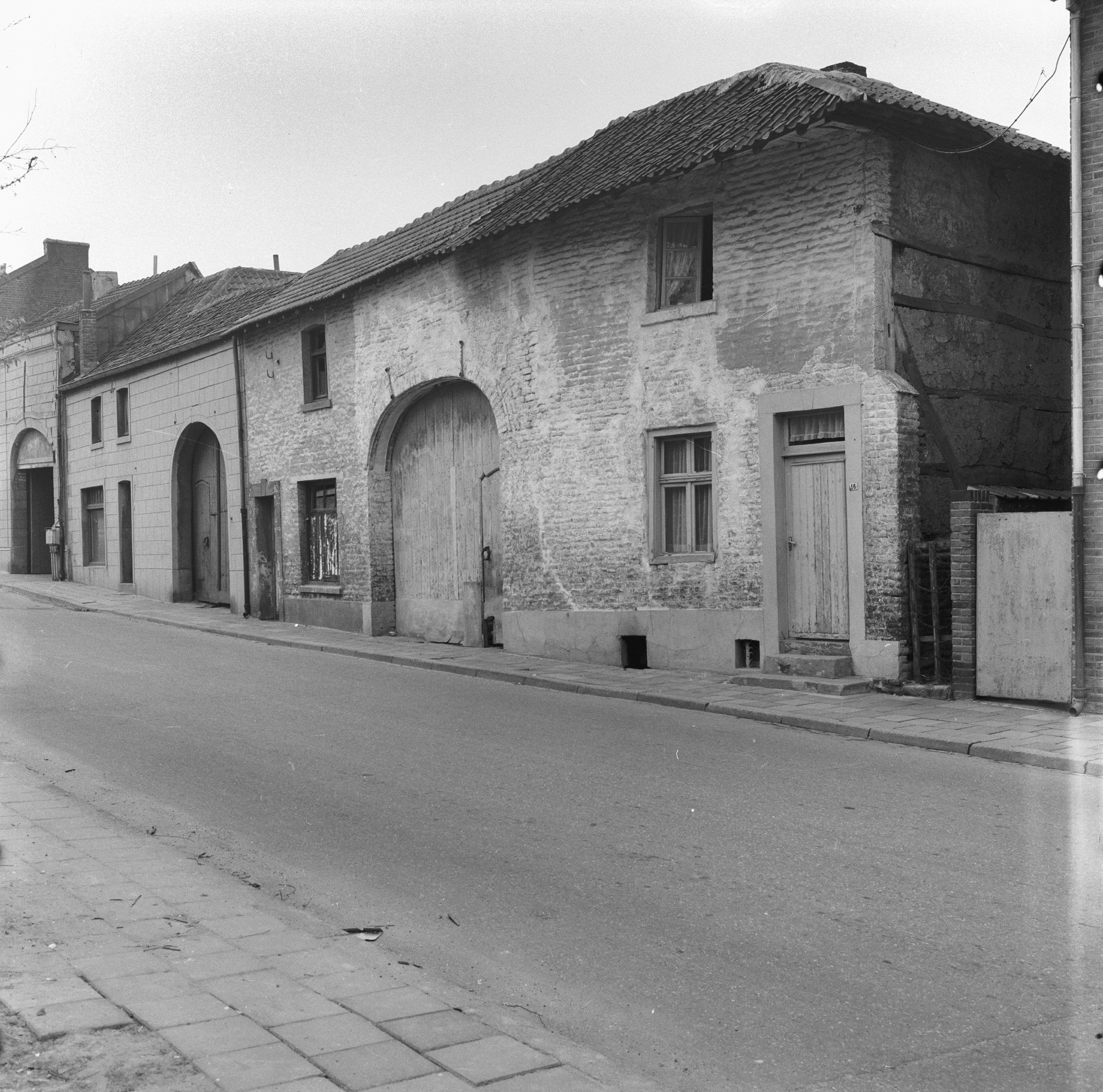 Herestraat 16-22